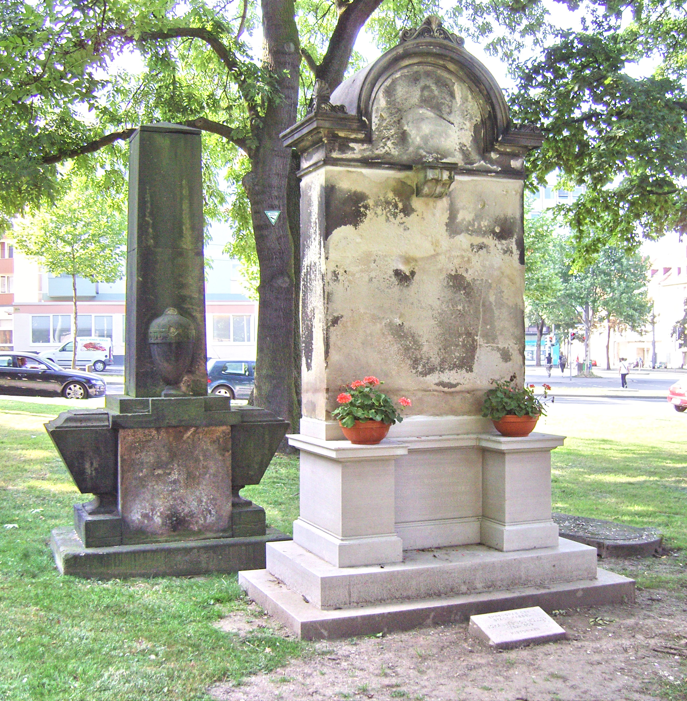 Grabmal des Johannes von Müller. Gestiftet 1852 vom König von Bayern. Entwurf: Leo von Klenze und Friedrich Brugger